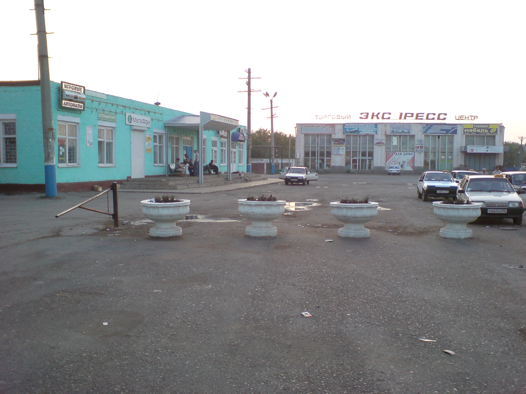 Автовокзал и торговый центр в Абдулино